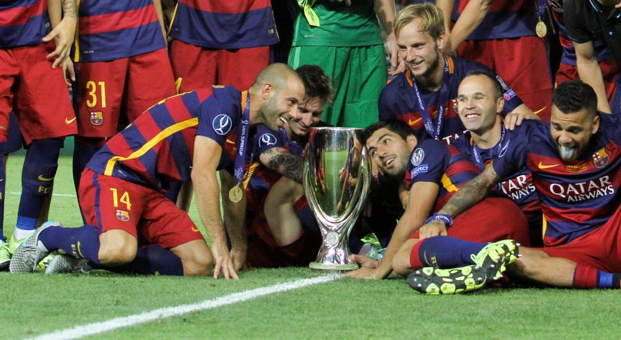 Нагородження переможців матчу за Суперкубок УЄФА 2015 року у Тбілісі. Грузія